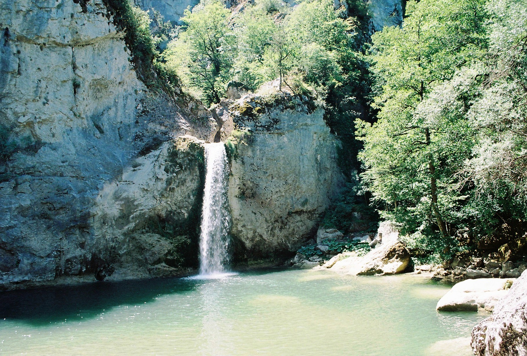 IlıcaWaterfall,at Küre national Park,near Pınarbaşı,Kastamonu,Turkey